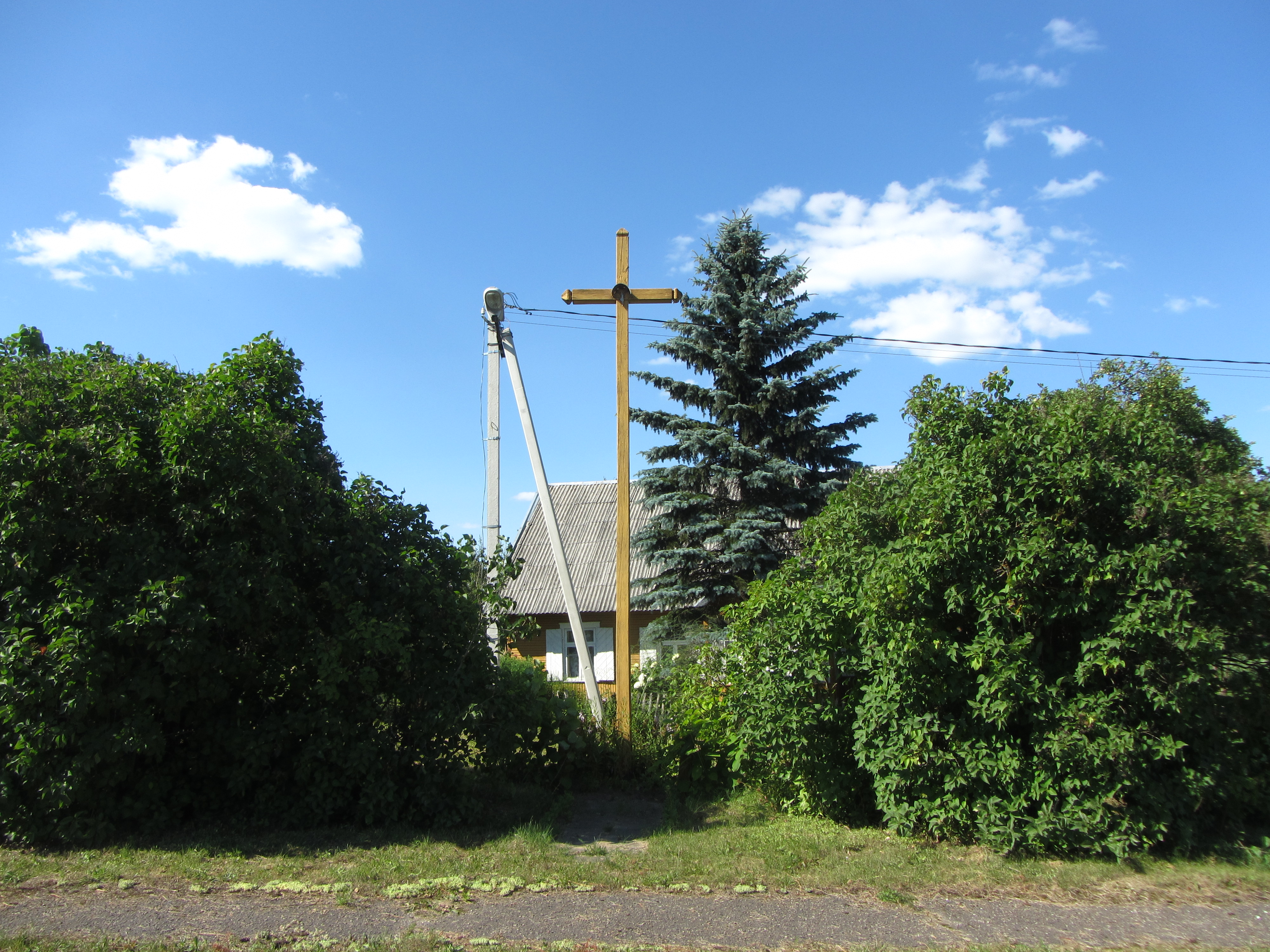 Šešuolėliai I, Lithuania